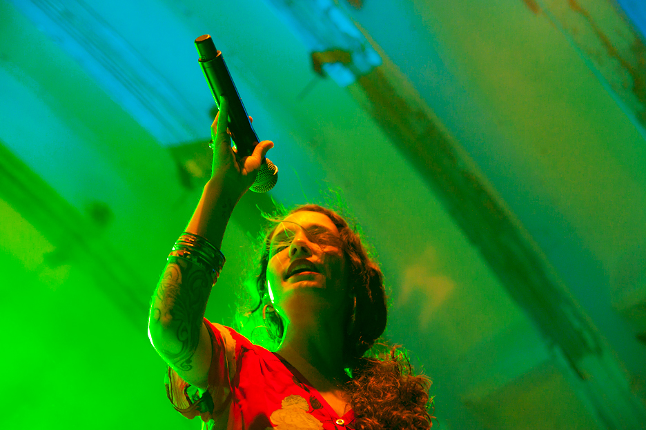 Ileana Cabra, més coneguda com iLe, cantant porto-riquenya